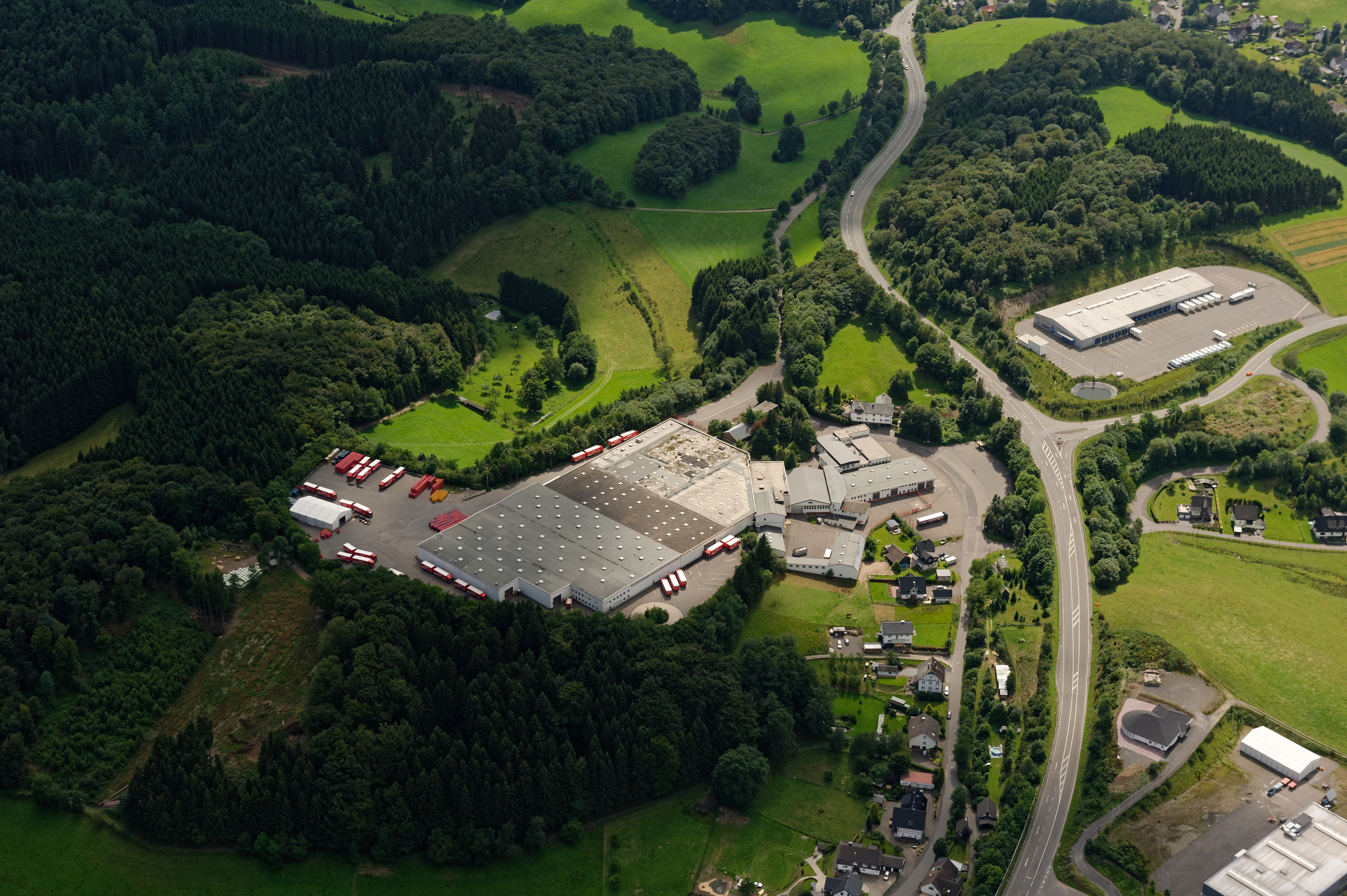 Fotoflug Sauerland West. Werksgebäude des Unternehmens Coca-Cola Erfrischungsgetränke in Drolshagen-Germinghausen; Landesstraße 708. The making of this document was supported by the Community-Budget of Wikimedia Germany.